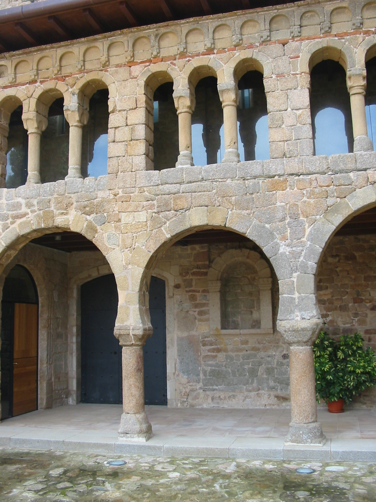 Sant Feliu de Guixols, Costa Brava, Catalonia: Porta Ferrada (11th century)